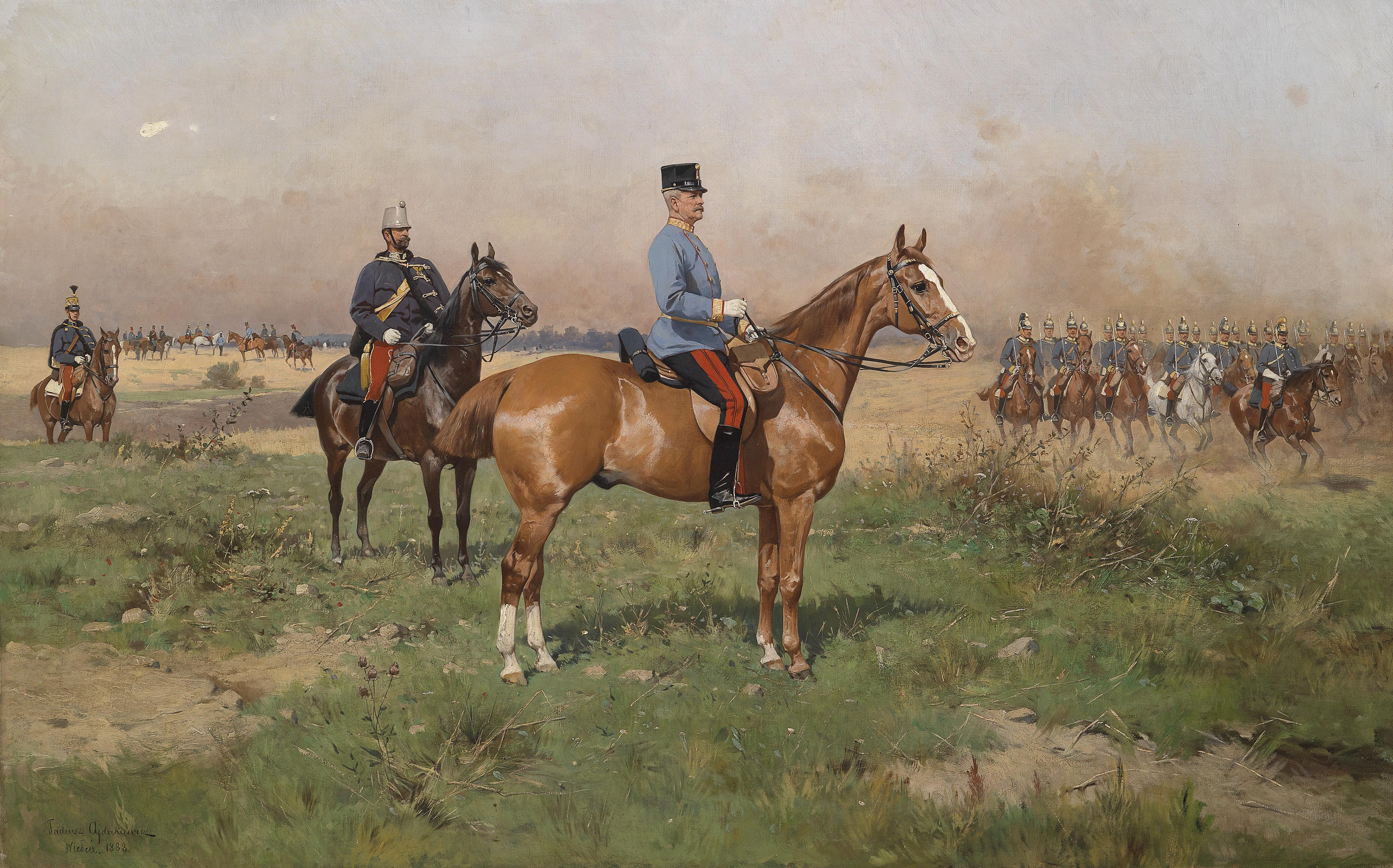 General Prinz Leopold von Croy in Campagneuniform zu Pferd während eines Manövers, im Hintergrund Husaren-Stabsoffizier als Generaladjutant mit Kommodtschako, im Hintergrund anreitende Dragonereskadron, sowie ein einzelner Husar. Signiert, bezeichnet und datiert Tadeusz Ajdukiewicz Wieden 1888, Öl auf Leinwand, 80 x 126,5 cm